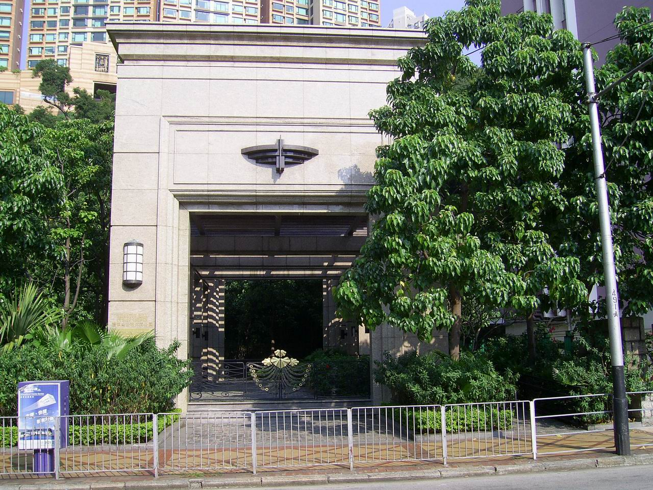 中文（香港）: 禮頓山公眾休閒公園大門常關